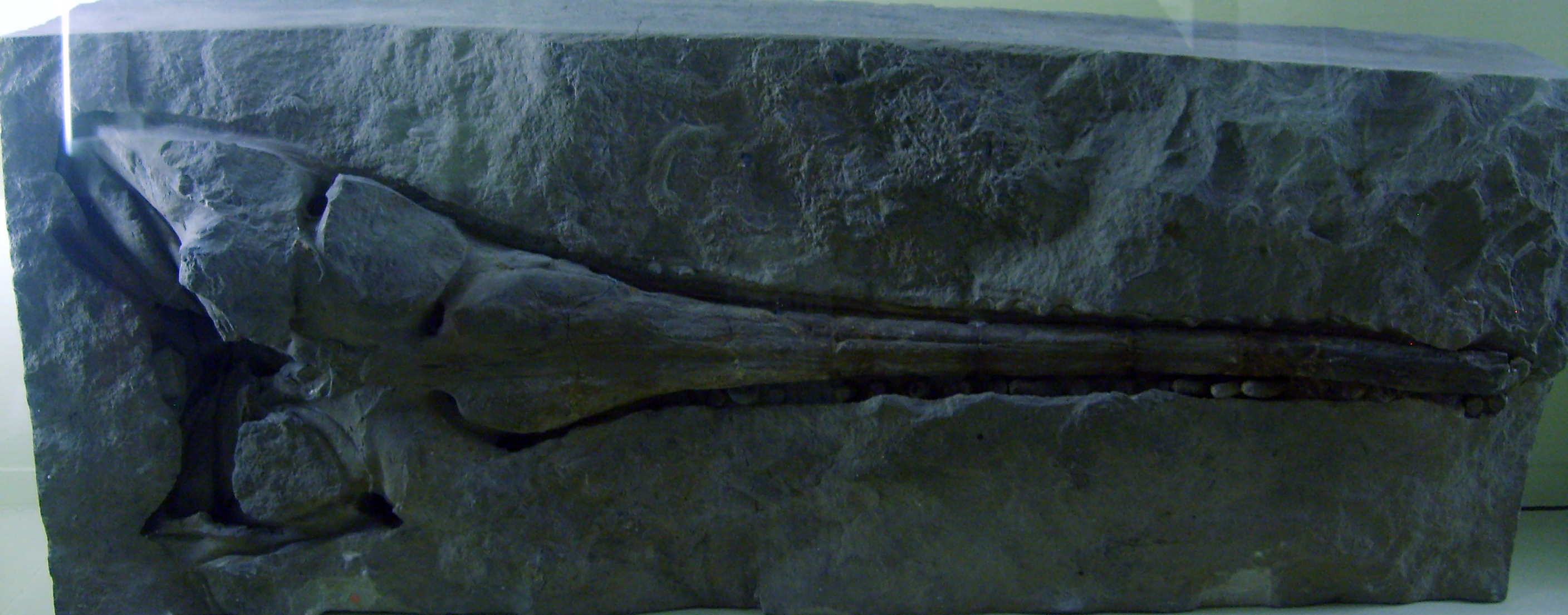 Pholidosaurus meyeri fossil at the Museum für Naturkunde, Berlin.